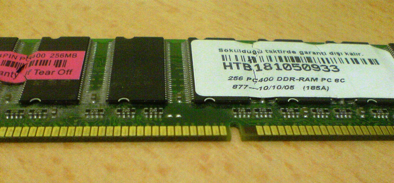 DDR 400 RAM